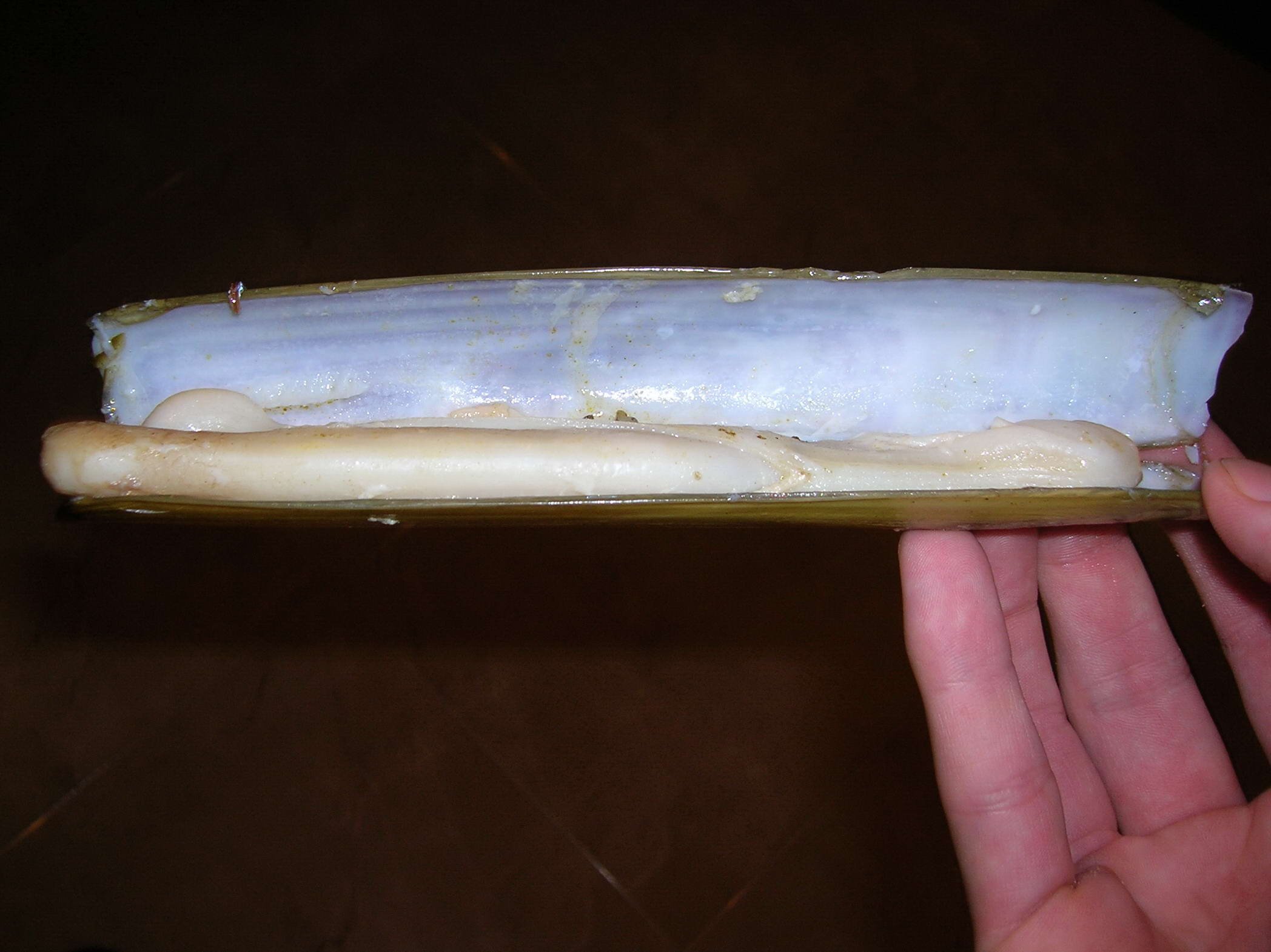 Navalla; Razor Clam